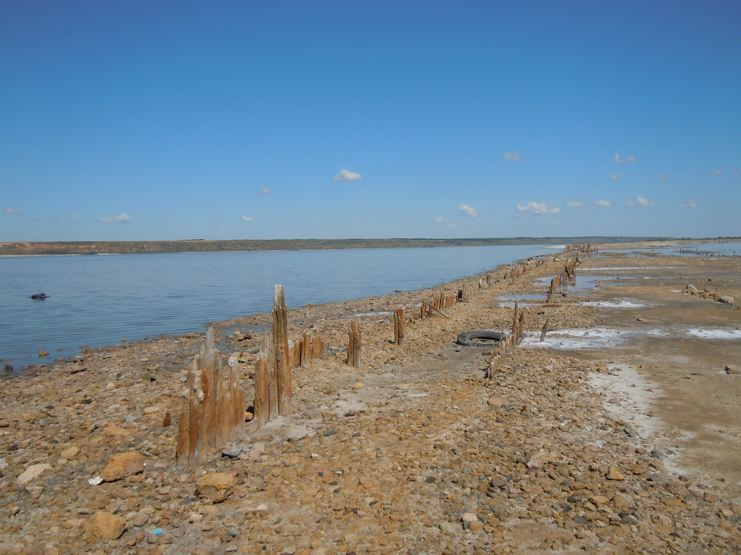 Укріплення до добування солі на Куяльницькому лимані